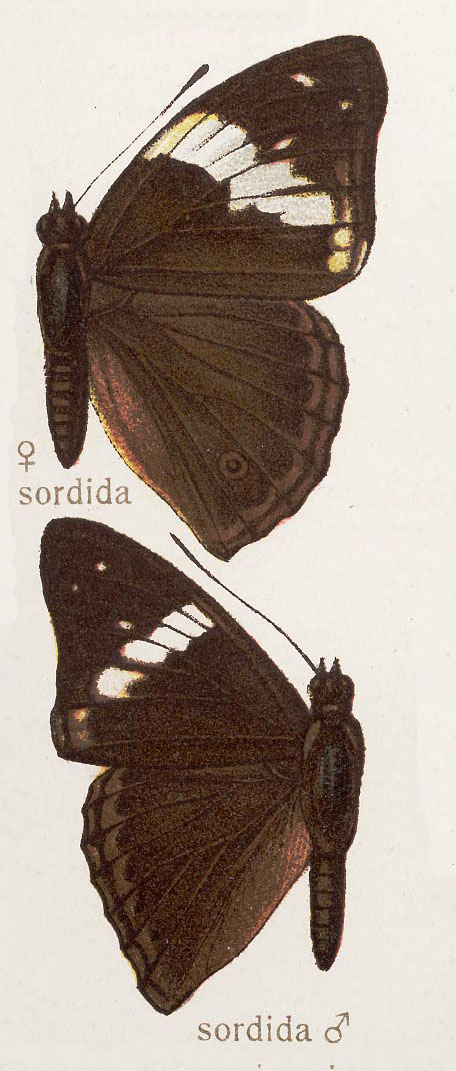 Chitoria sordida, Sordid Emperor